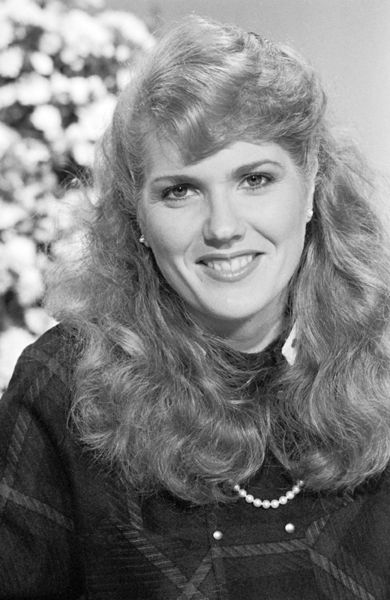 Christa Rosier, 1984, EO, Archief Beeld en Geluid, catalogusnummer 841052, kb2, fotonummer 6.